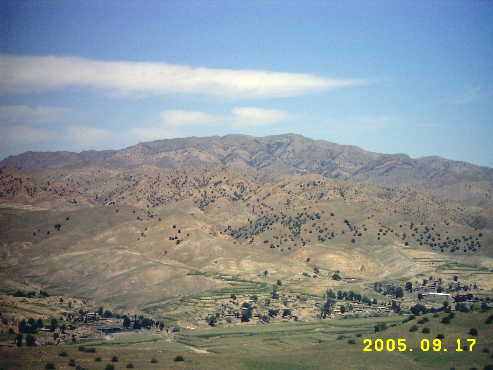 远望敖包山